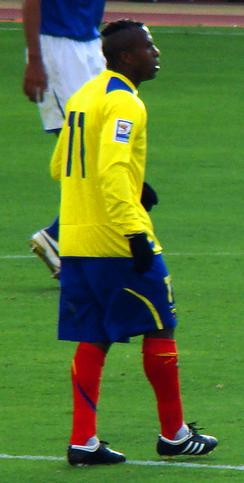 Christian Benítez